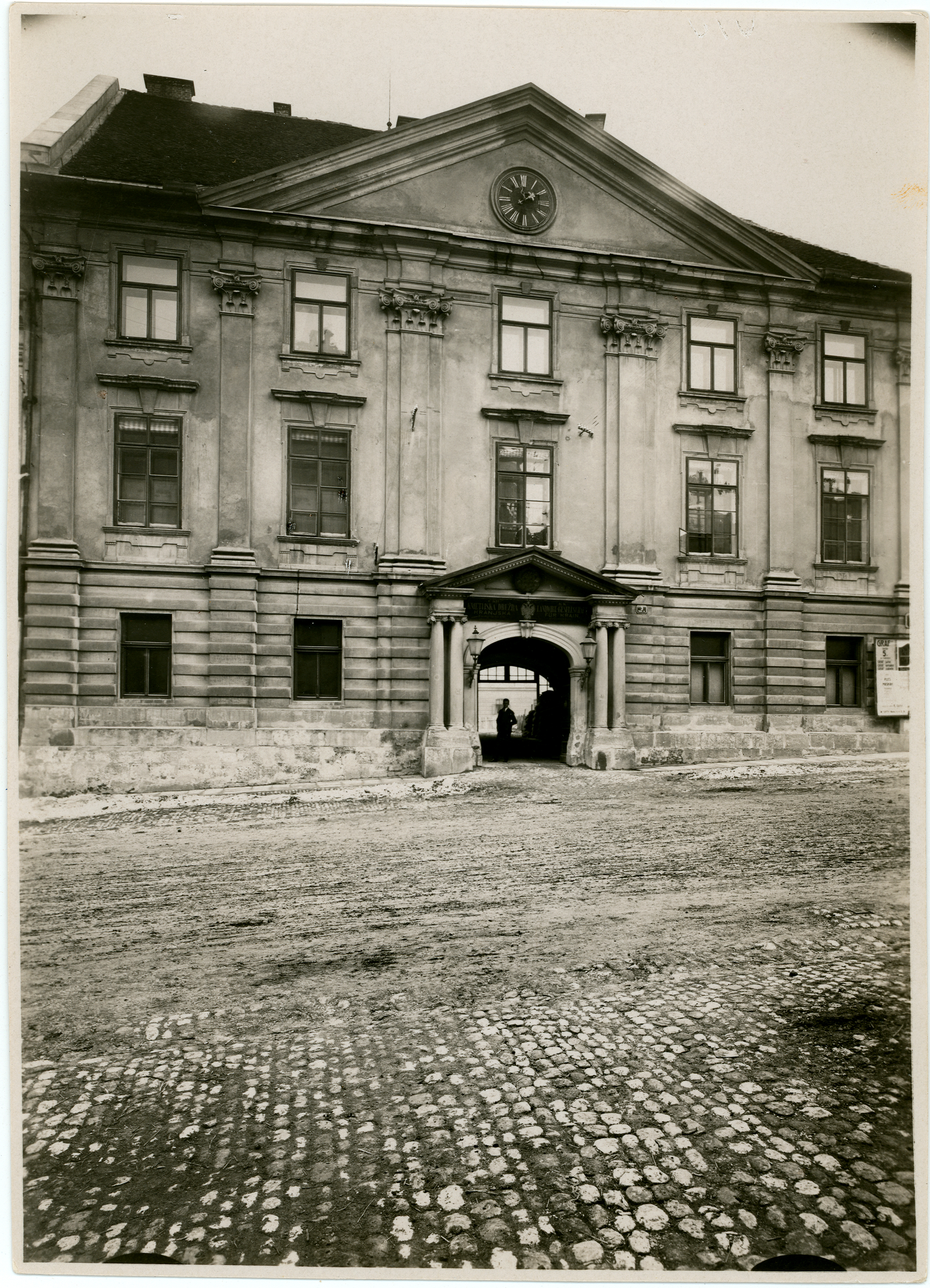 Lontovž na Novem trgu 3, leta 1910